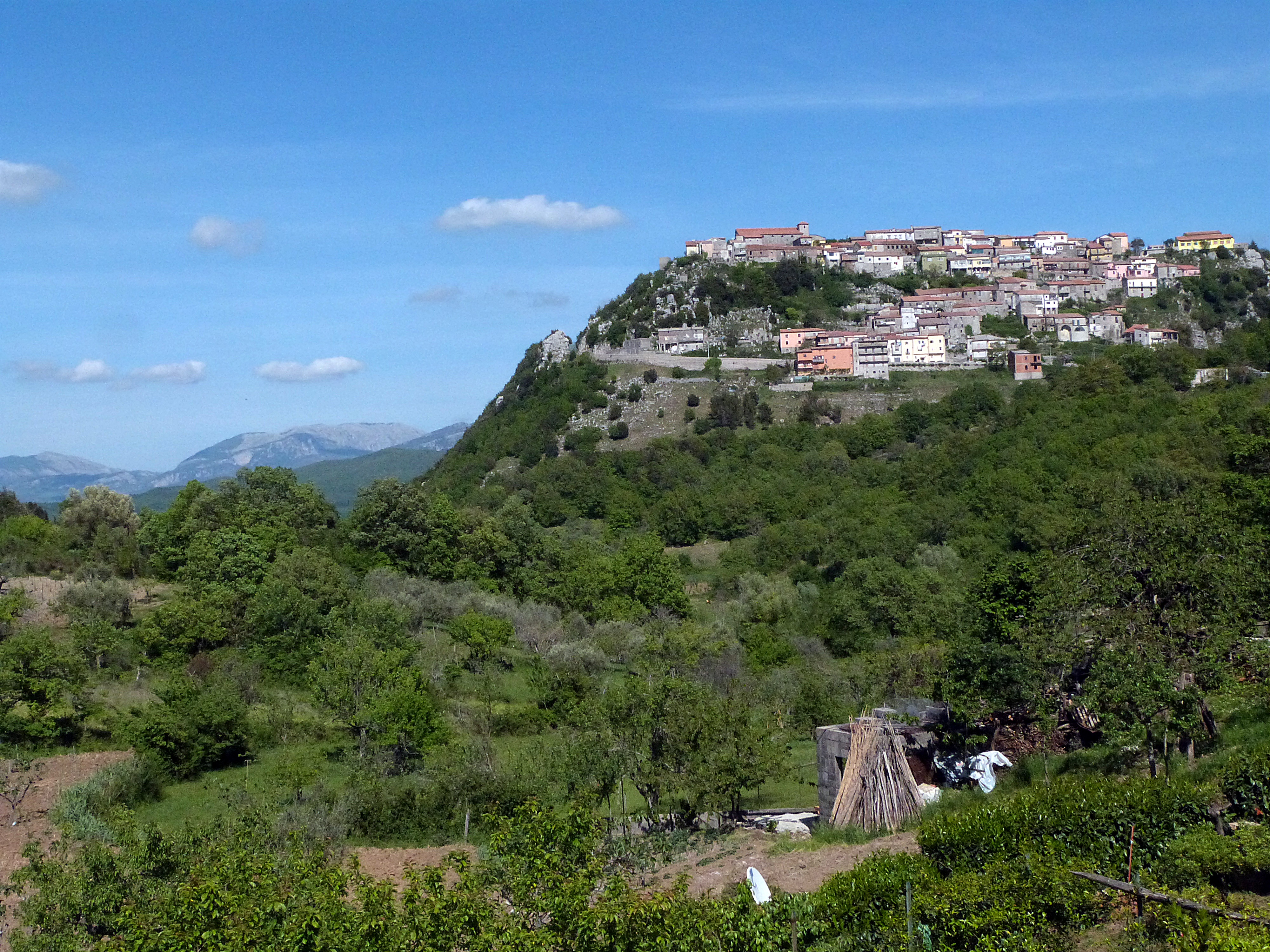 Blick auf Trentinara